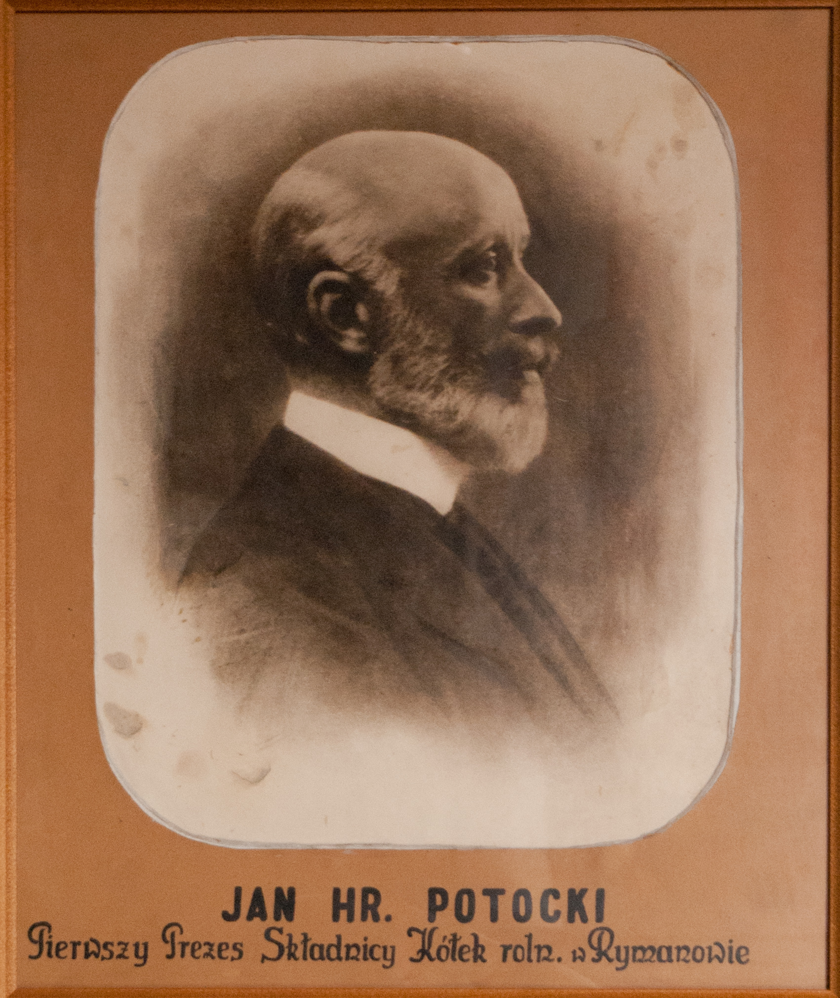 Portret Jana Nepomucena Potockiego, ekspozycja Izby Regionalnej w Rymanowie.